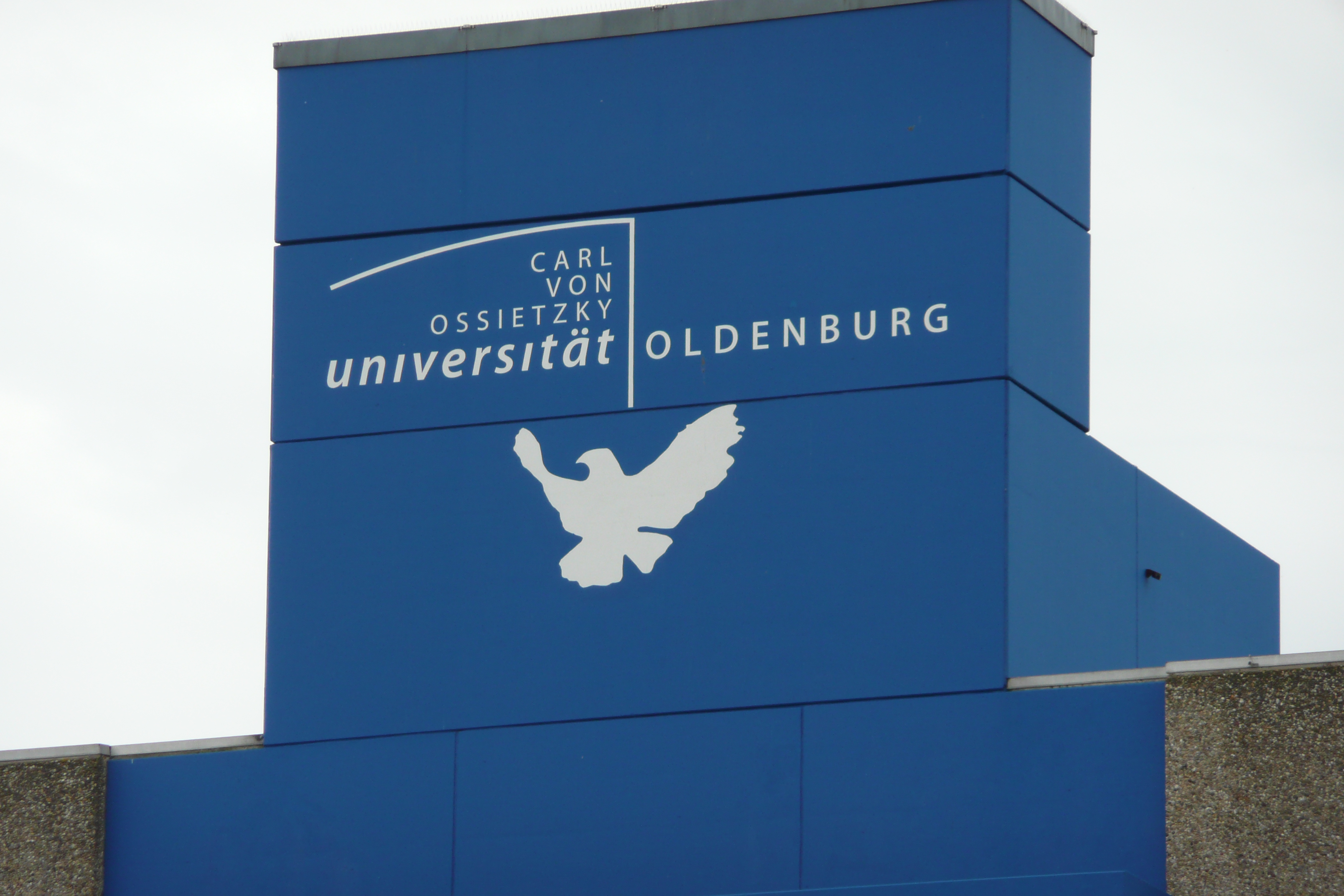 Logo der Universität Oldenburg auf dem AVZ